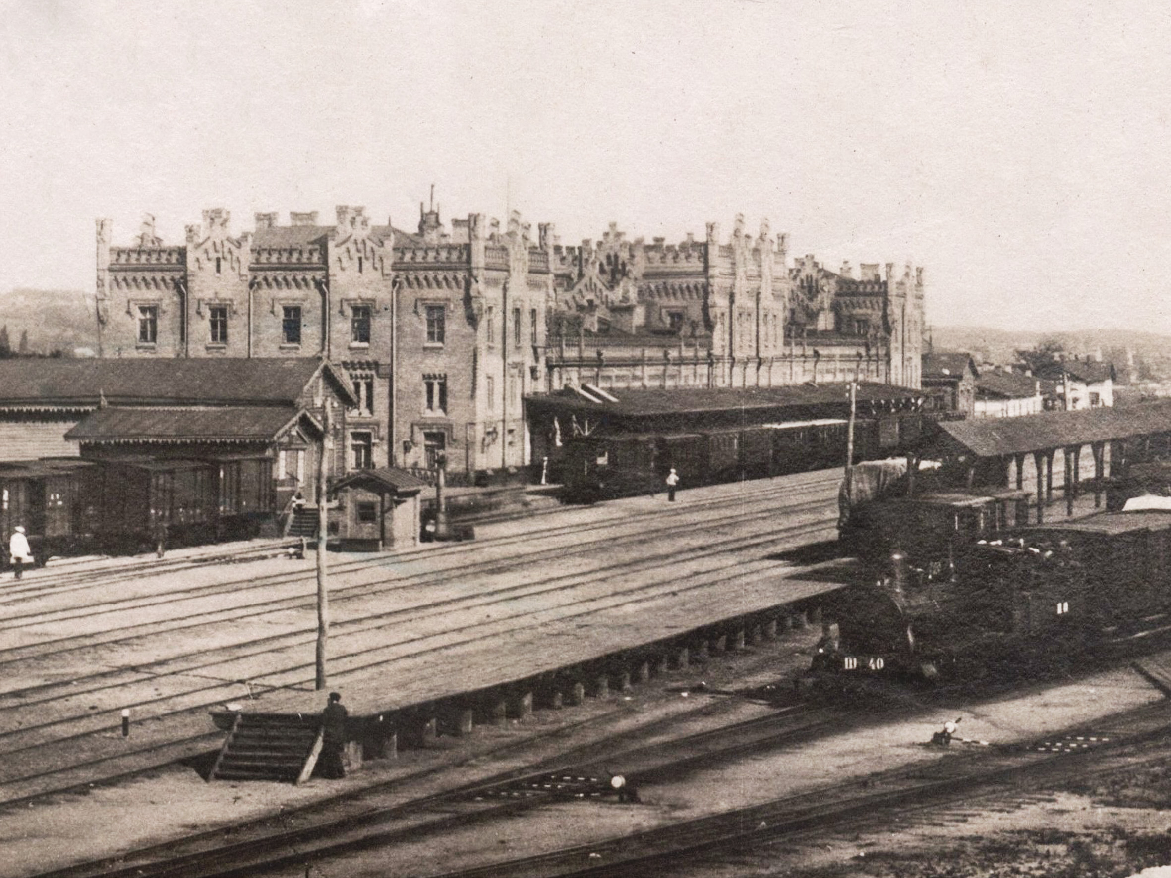 Залізничний вокзал. Київ.